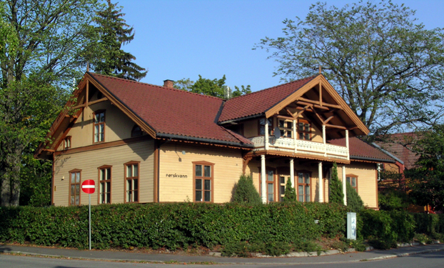 Villa Fagervik, Østre gate 72, Hamar. Bygd 1868.